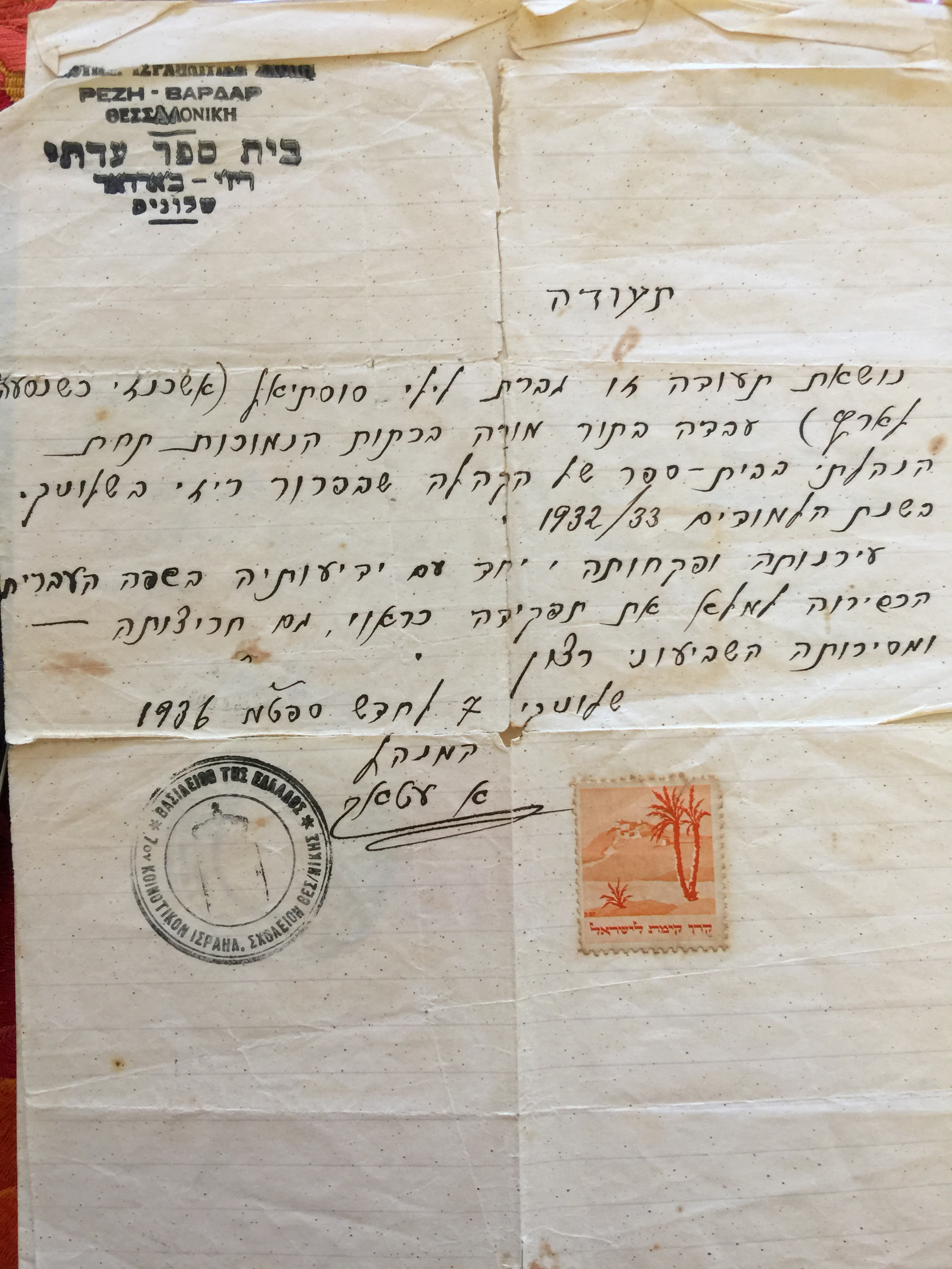 המלצה שקיבלה לילי מנחם לפני עלייתה ארצה